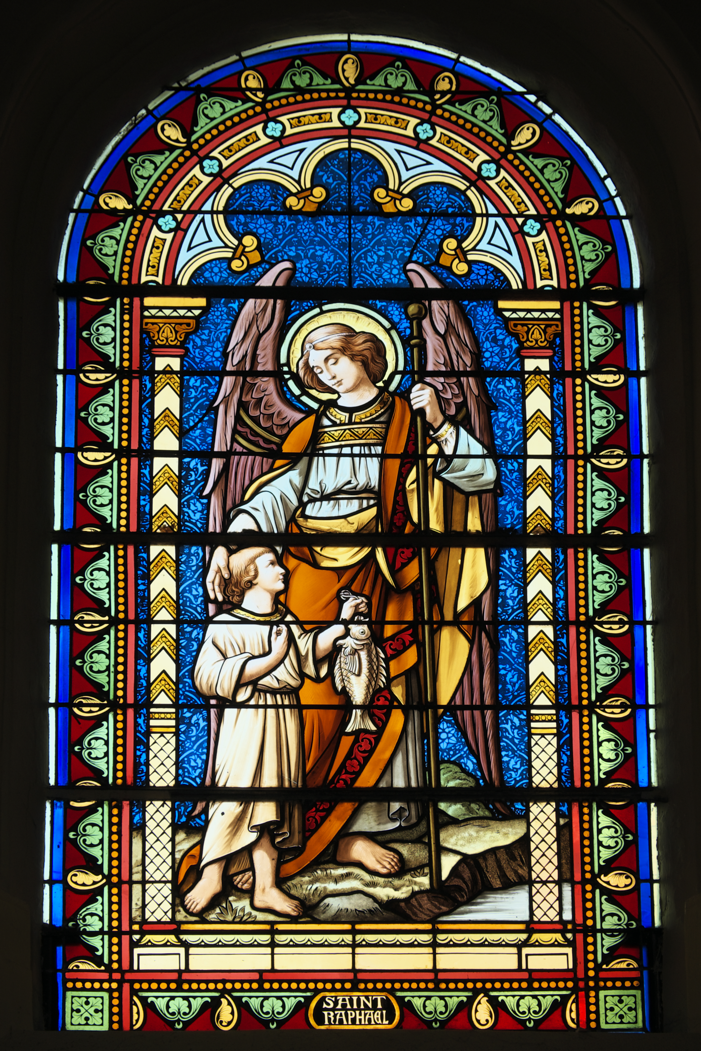 Katholische Pfarrkirche Saint-Jean-Baptiste in Carrières-sur-Seine im Département Yvelines (Île-de-France/Frankreich), Bleiglasfenster (baie 5) aus dem Ende des 19. Jahrhunderts; Darstellung: Erzengel Raphael